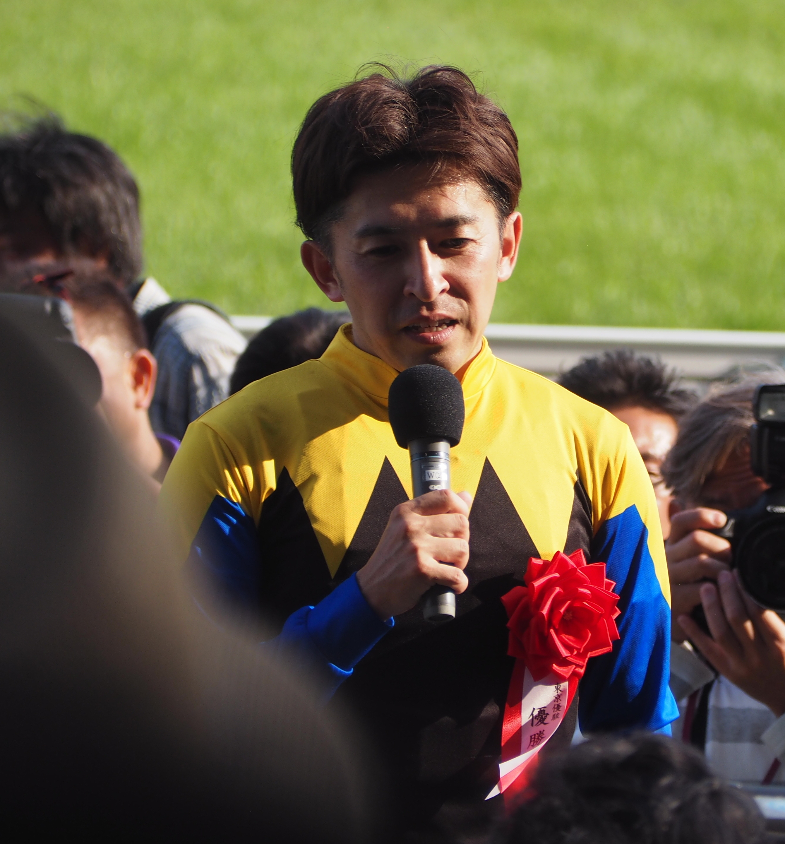 10R 東京優駿(日本ダービー)